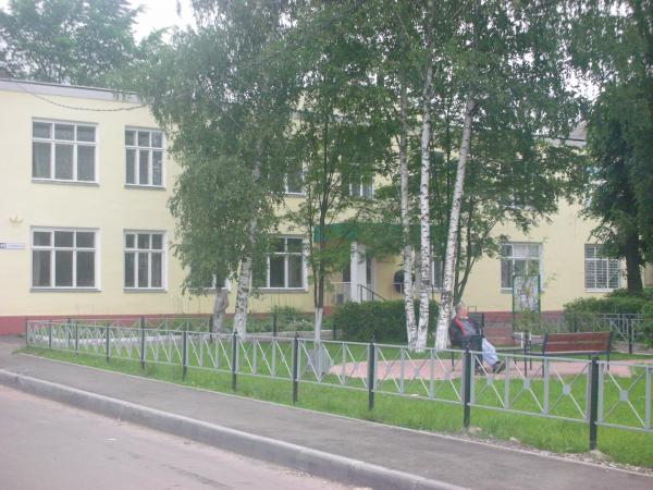 Администраци Дорохова и Дороховского сельского поселения. Рузский район, Московская область.